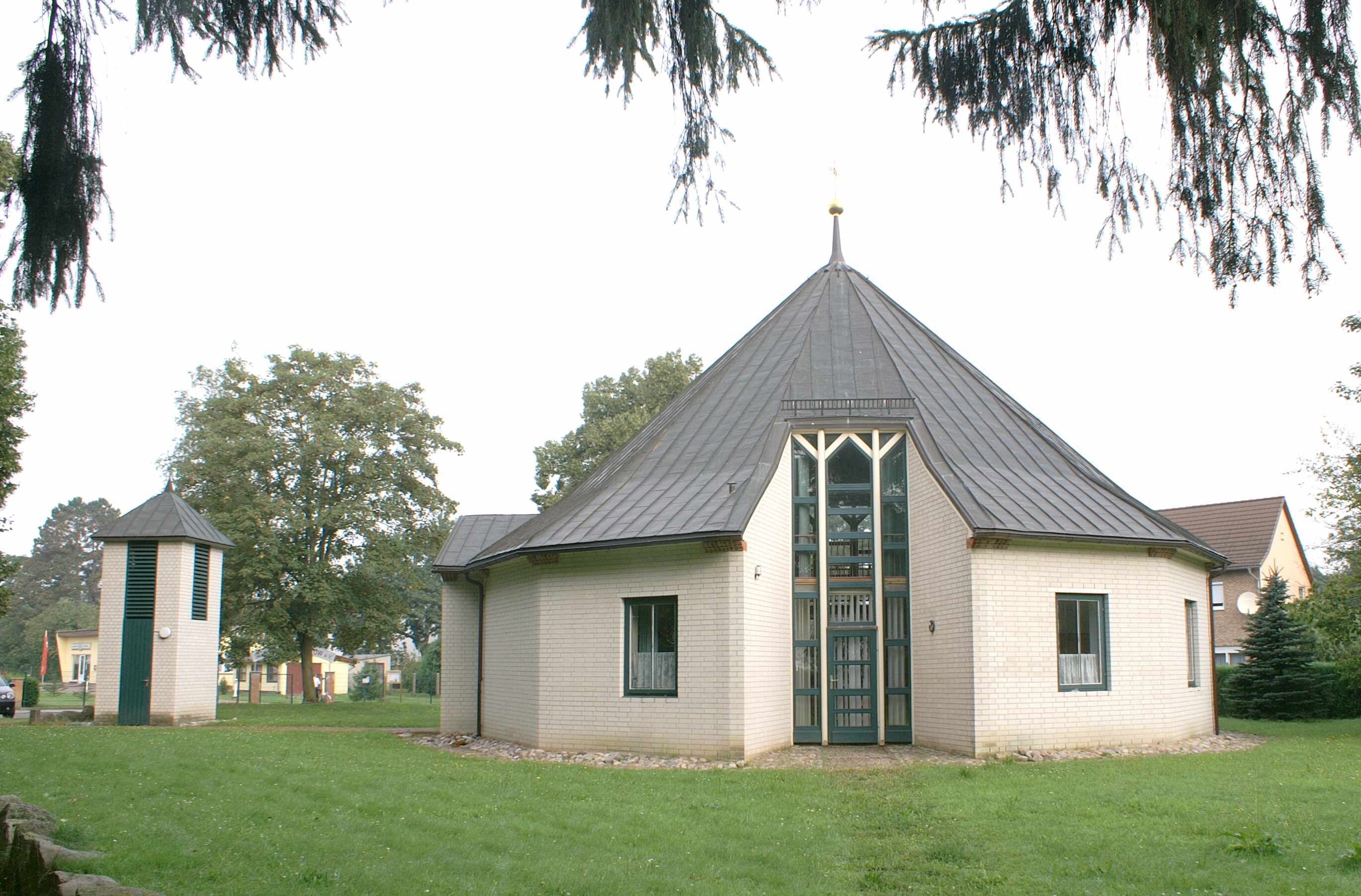 Tutow - Landkreis Demmmin - Zwölf-Apostel-Kirche